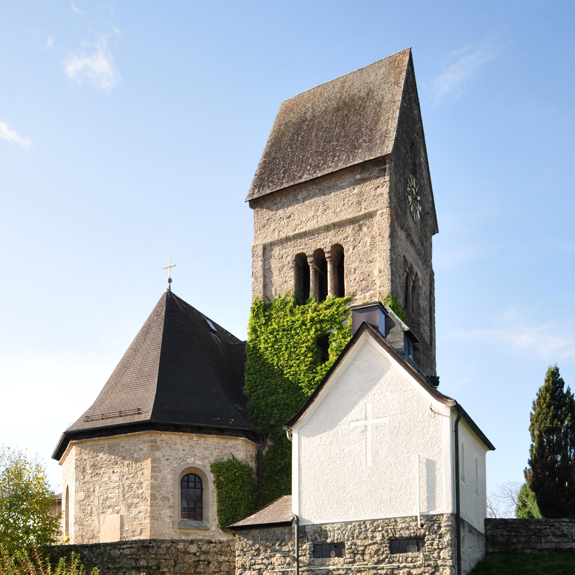 Kath. Pfarrkirche hl. Oswald in Anif, österreichisches Bundesland Salzburg Wikipedia im Landtag – Salzburg 31. Oktober 2012 in SalzburgDieses Foto wurde im Rahmen des Projektes „Wikipedia im Landtag“ erstellt.